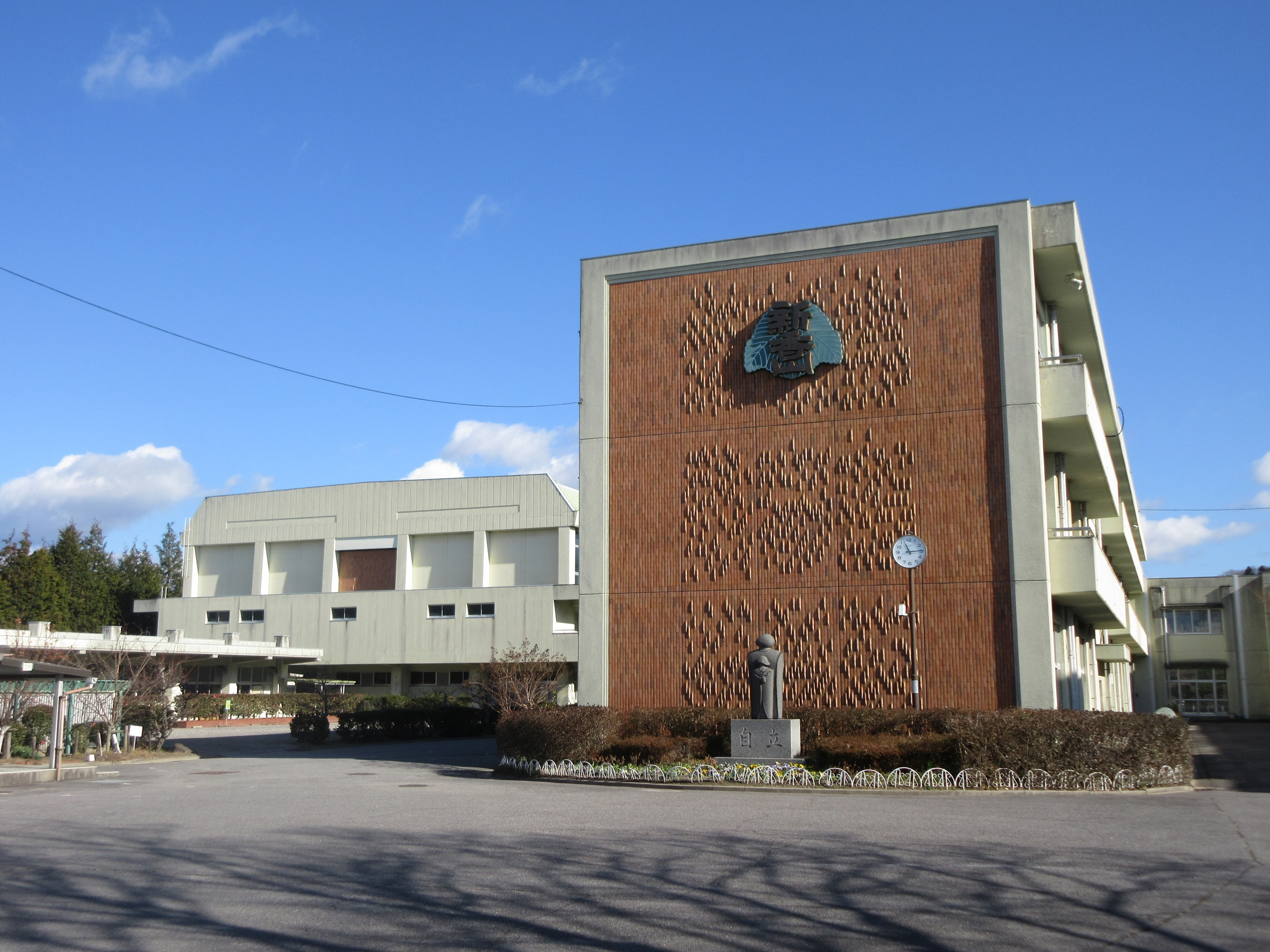 岡崎市立新香山中学校（岡崎市桑原町）